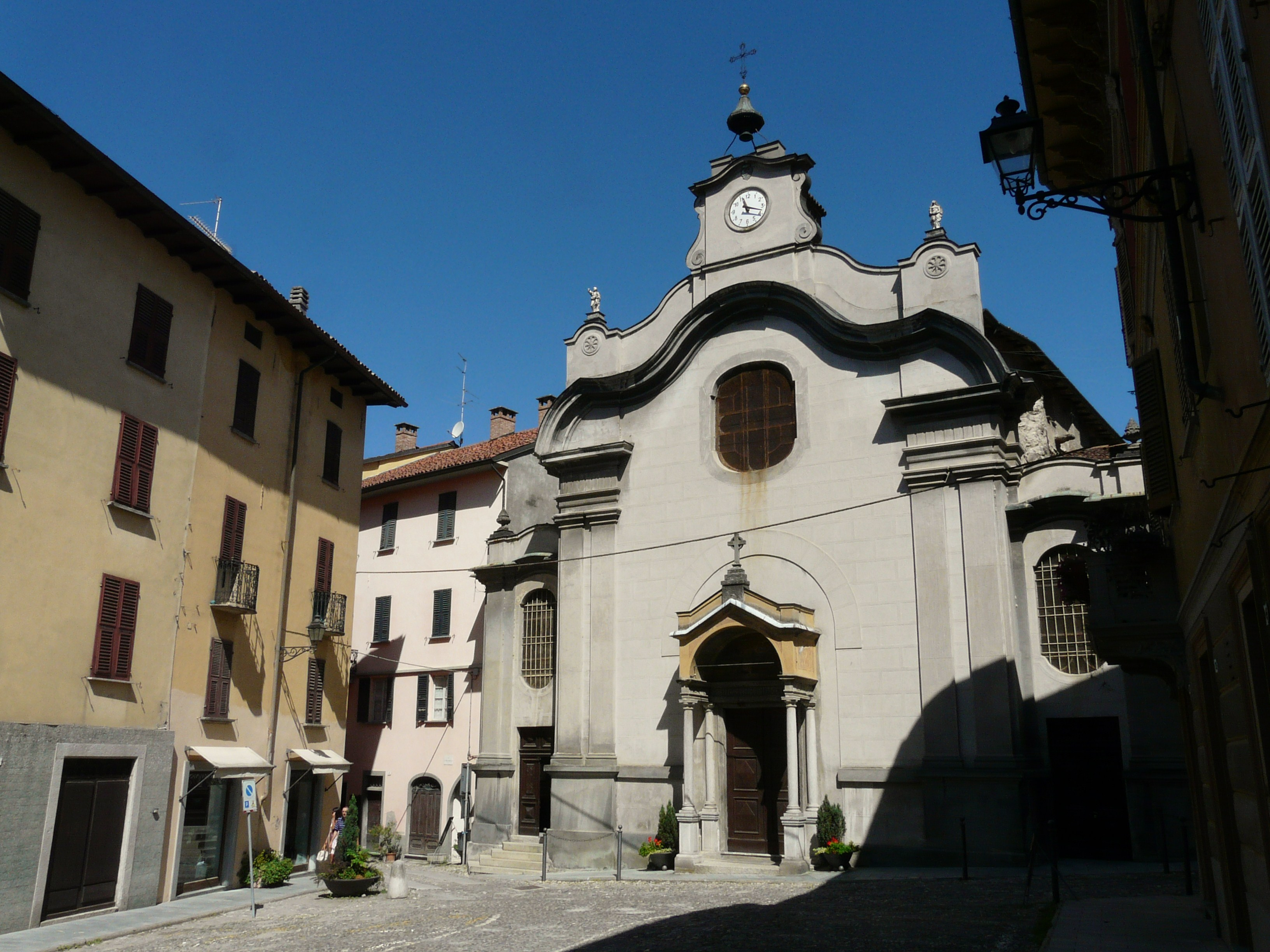 Chiesa di San Sebastiano Martire, San Sebastiano Curone, Piemonte, Italia